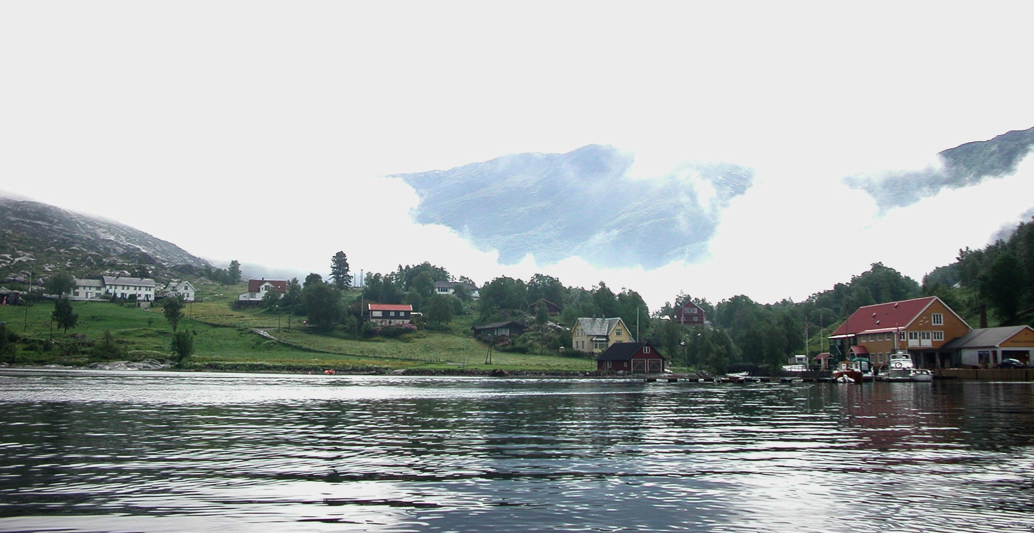 Dingja